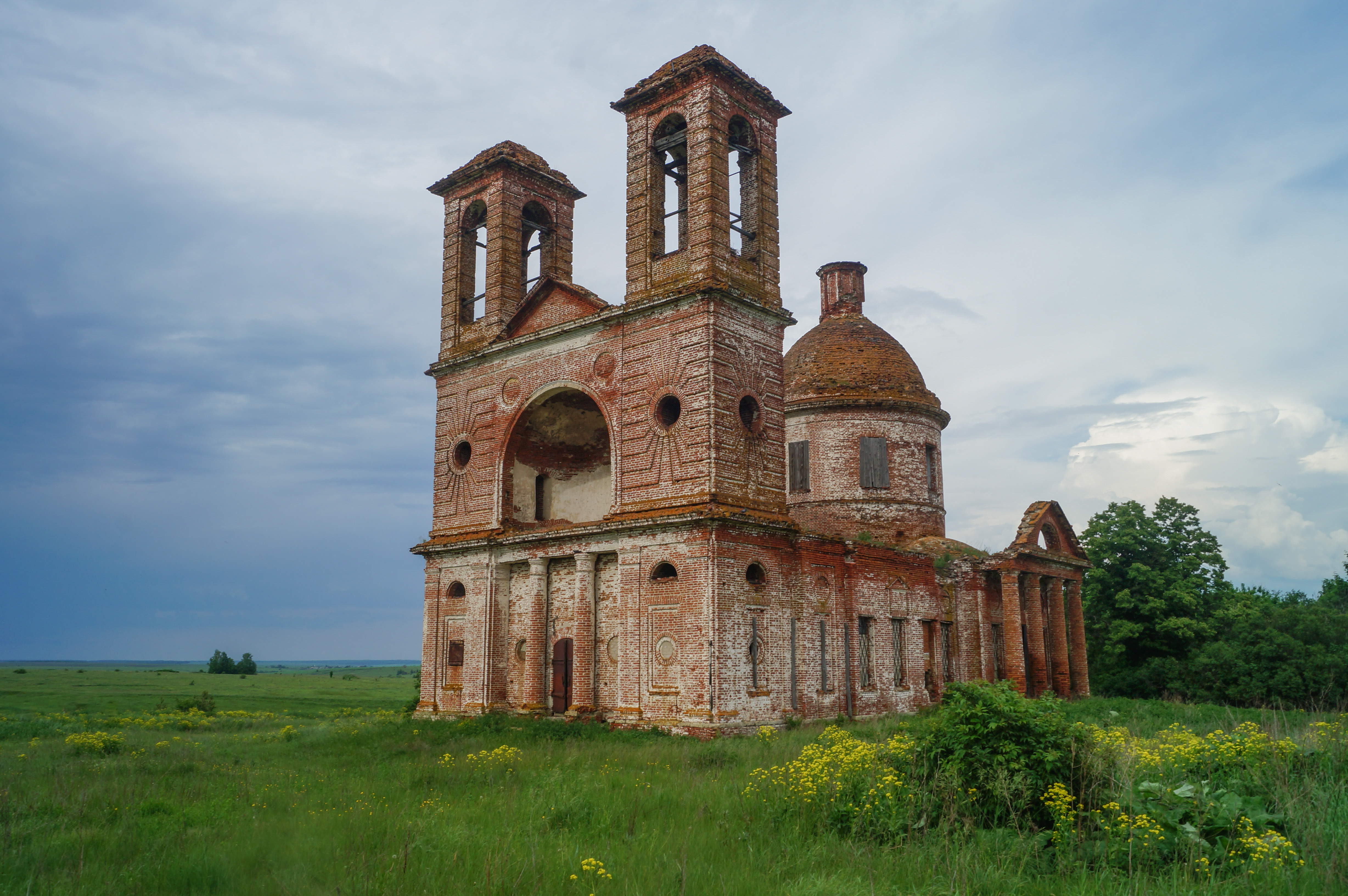 Церковь Михаила Архангела: Порошино, Пачелмский район, Пензенская область